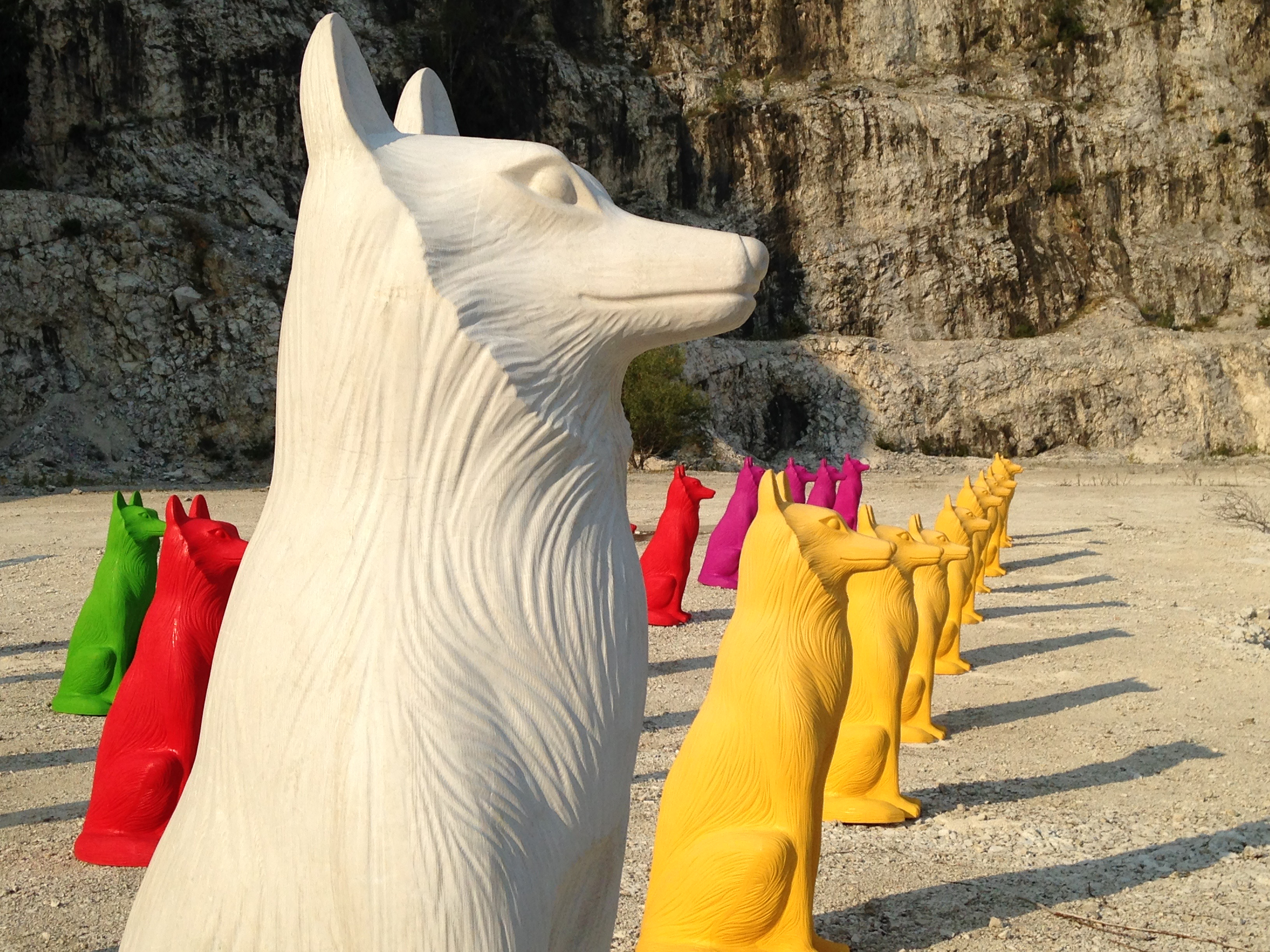 Renzo Nucara, "Cave Canem", installazione Cracking Art Group, 2016, Cava Burgazzi, Rezzato BS